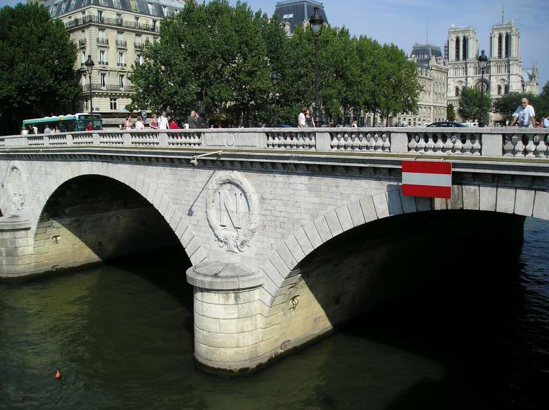 Pont Saint-Michel, dans le quartier Latin de Paris